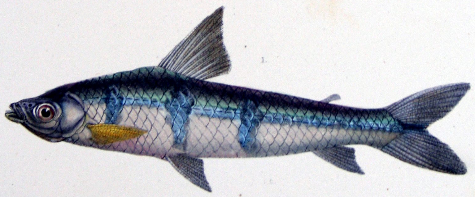 Piabuca vittata Cuv. Val. = Schizodon vittatus (Valenciennes, 1850)